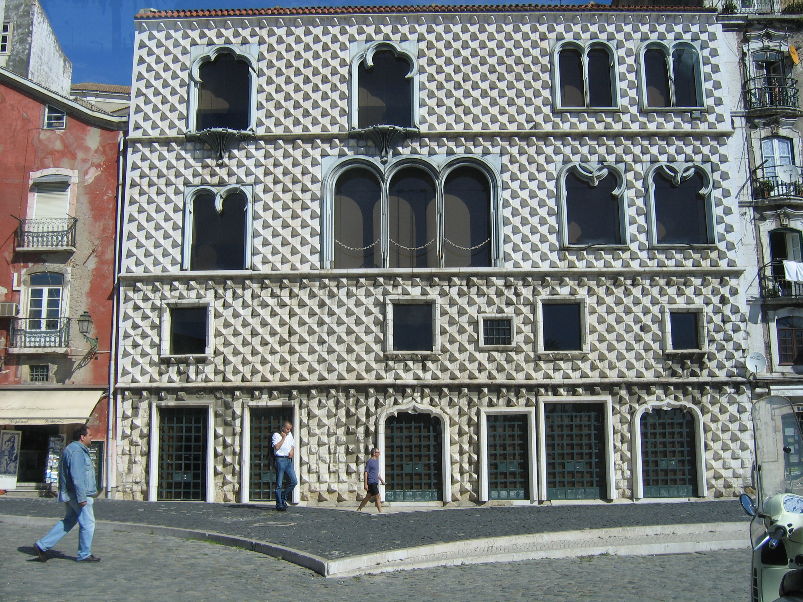 Casa dos Bicos (16th c.) in Lisbon, Portugal